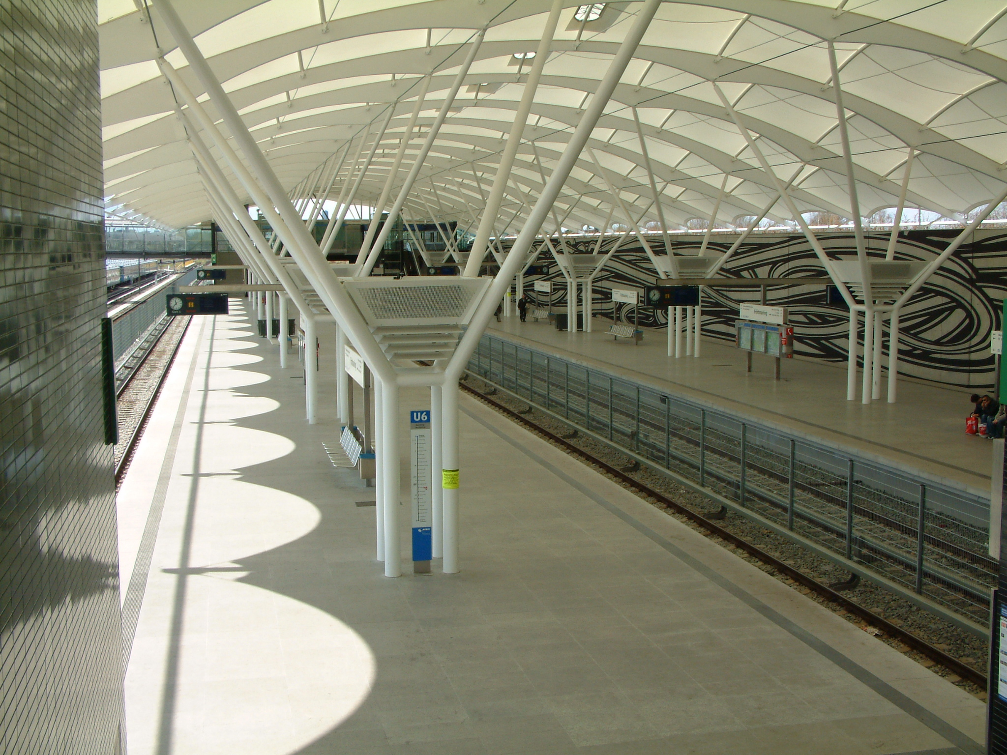 U-Bahnhof Fröttmanning München, Bayern, Deutschland